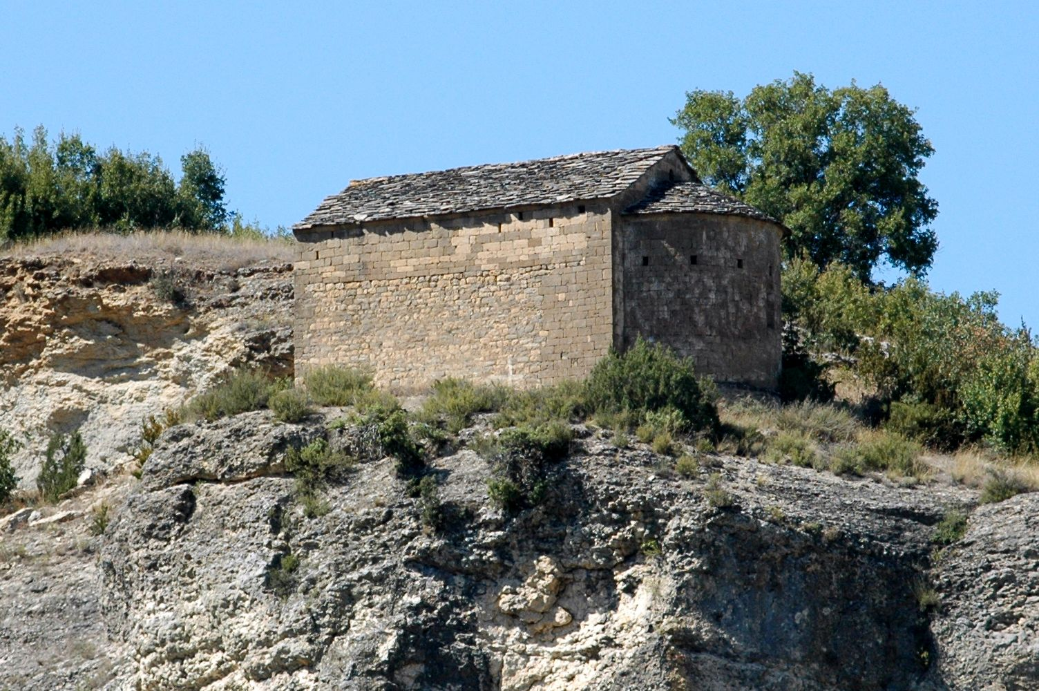 Nostra Senyora del Congost